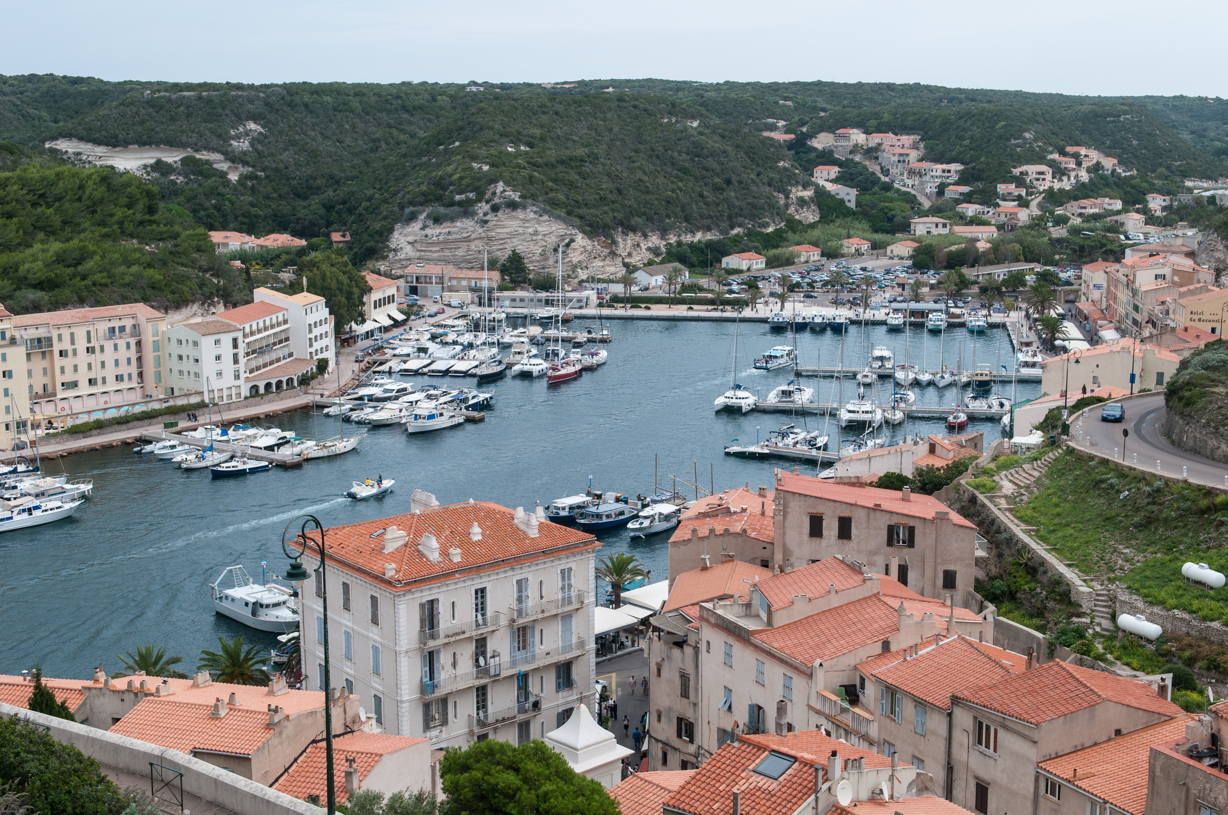 Bonifacio, Corsica